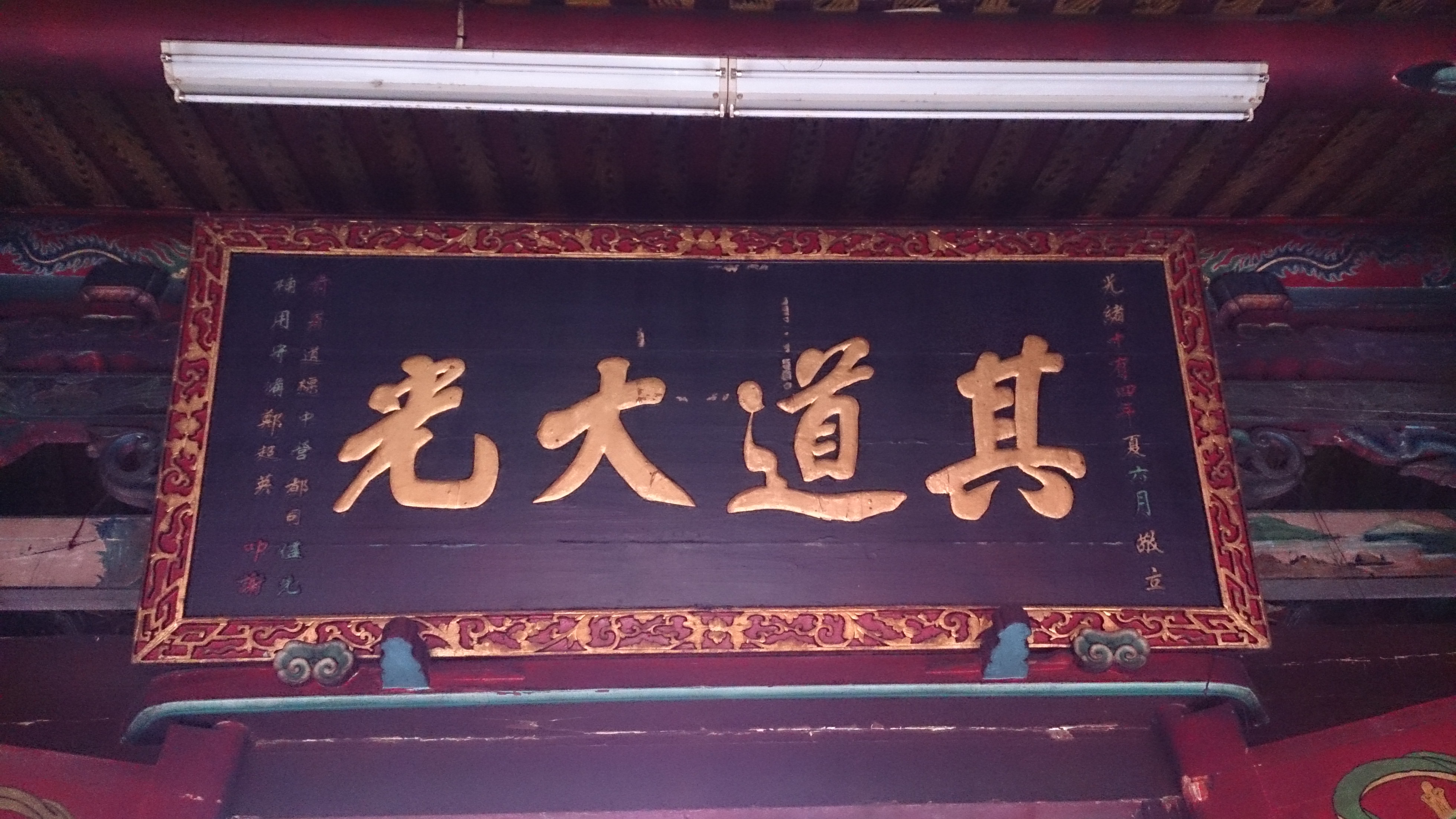 玉井北極殿「其道大光」匾(光緒十四年道標營都司鄭超英敬獻)